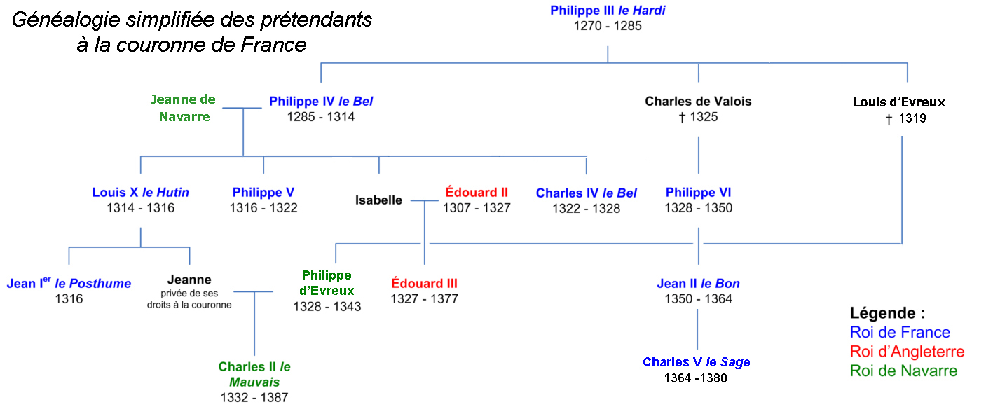 Descendance simplifiée de Philippe III de France dit le Hardi expliquant pourquoi Edouard III et Charles V sont prétendants à la couronne de France